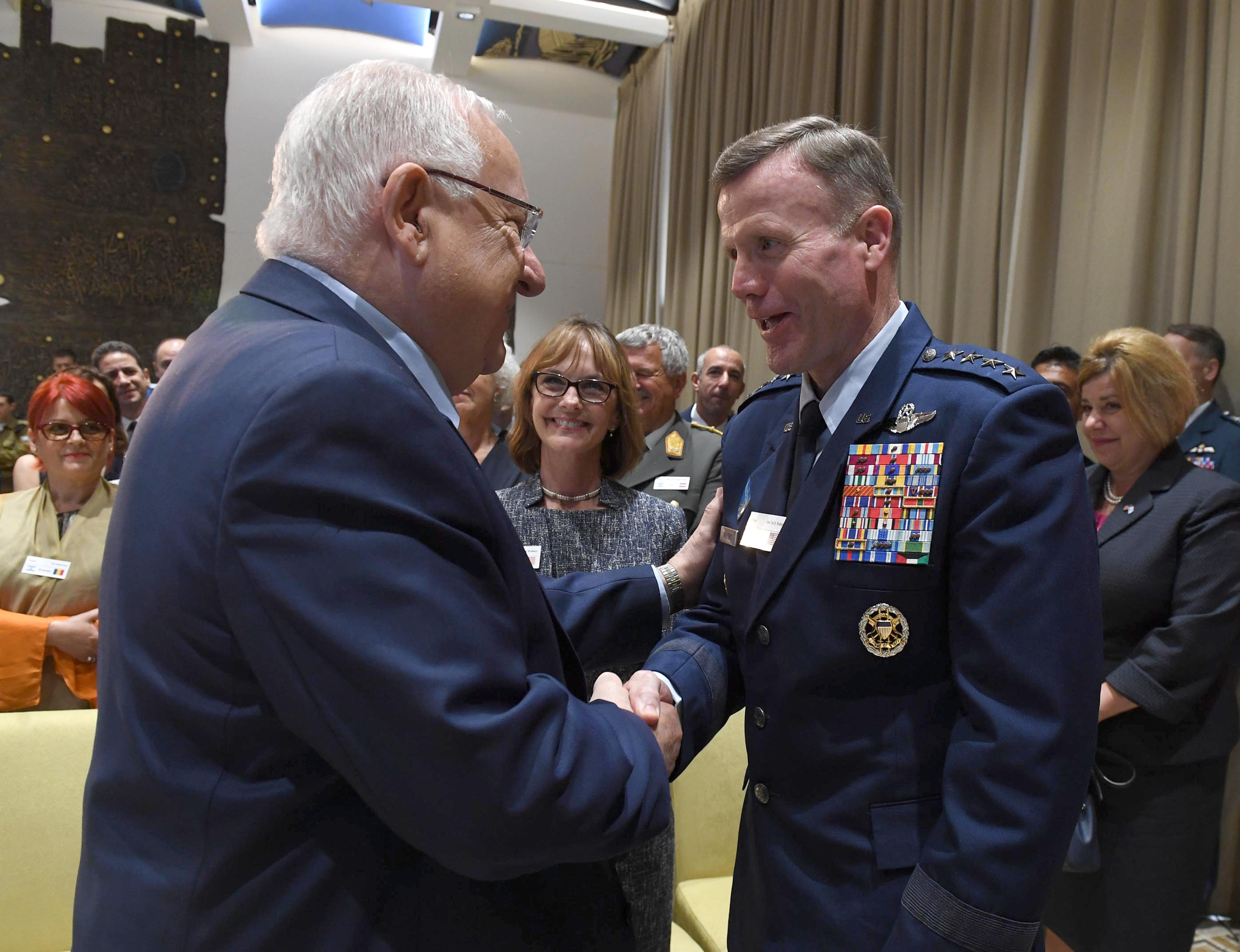 ראובן ריבלין נשיא מדינת ישראל בכנס מפקדי חיילות האוויר מהעולם שהתקיים בירושלים בתמונה:ראובן ריבלין עם טוד וולטרס גנרל בחיל האוויר של ארצות הברית